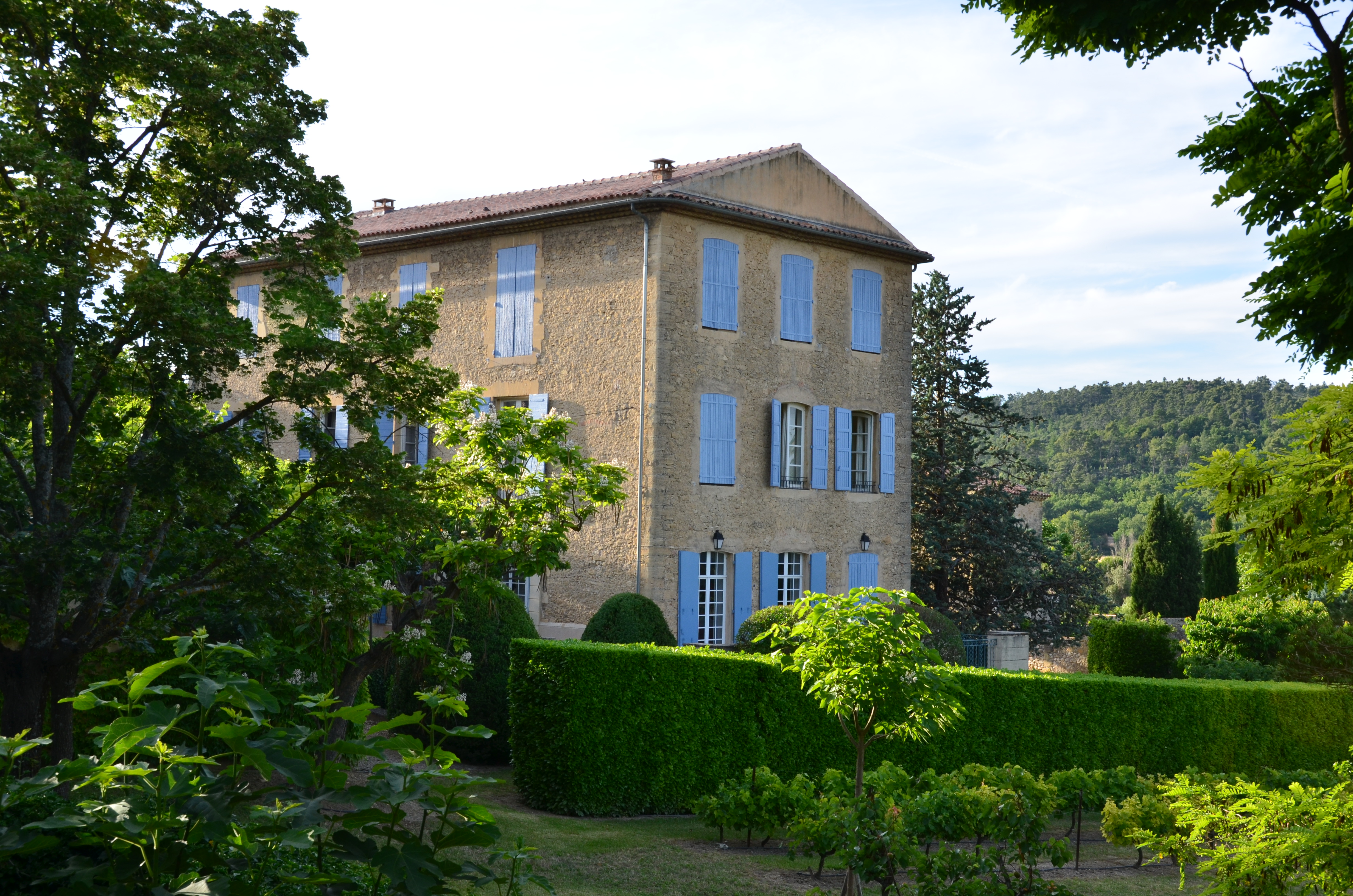 Ancienne magnanerie de Mirabeau dans le Vaucluse.